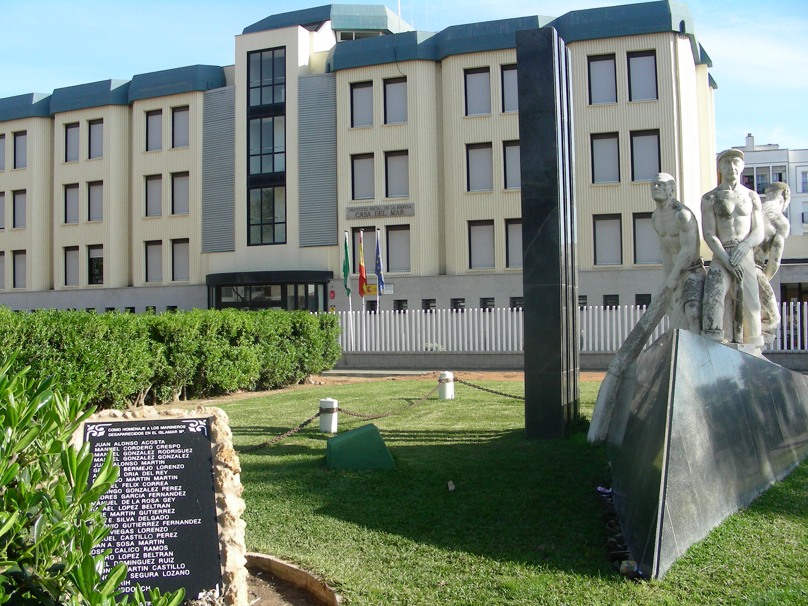 monumento y placa al naufragio del Islamar III en Isla Cristina